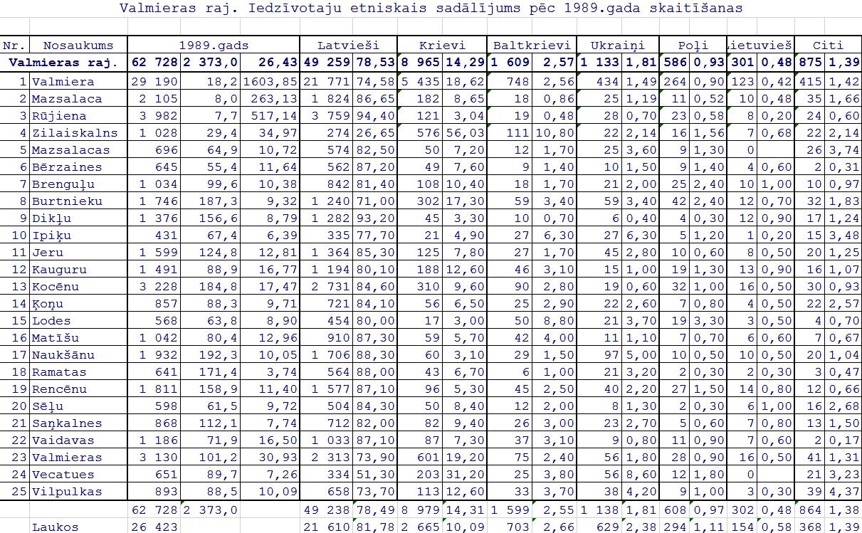 Этнический состав населения Латвии по переписи 1989 года